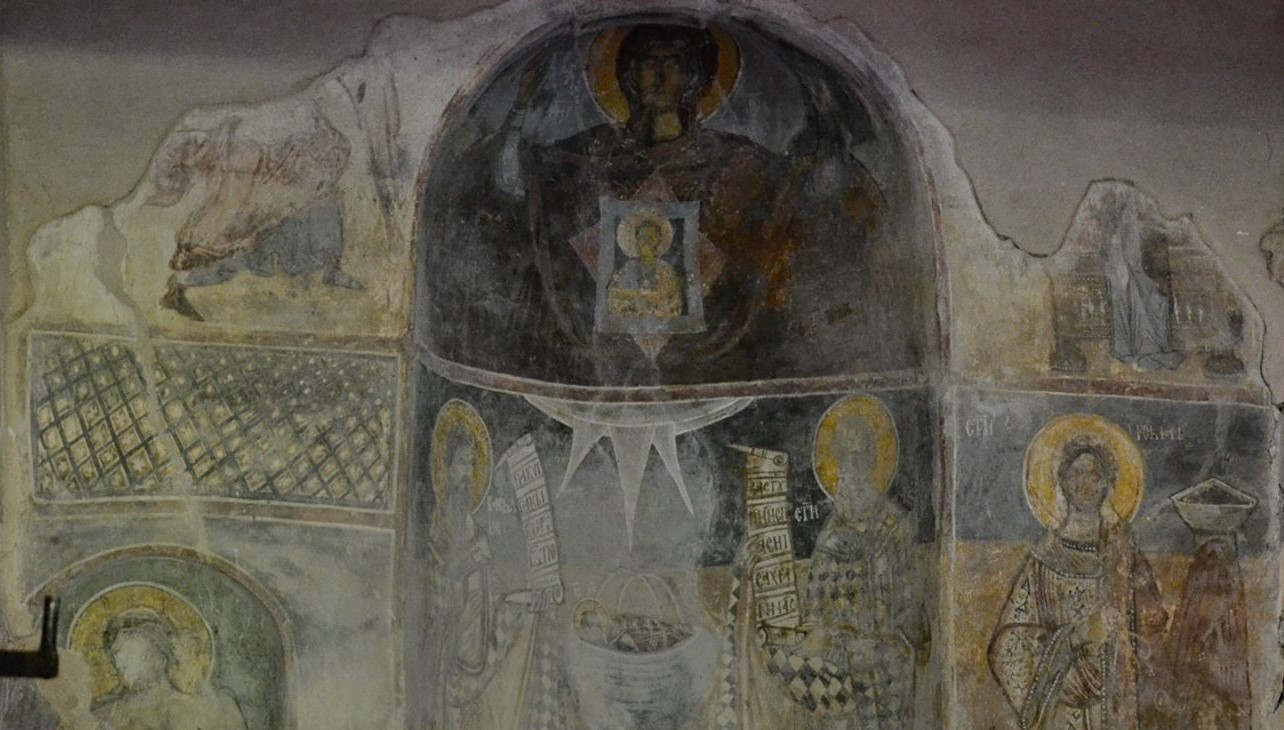 Фреска во олтарниот дел на црквата „Св. Ѓорѓи“ во светиниколско Ѓуземелци